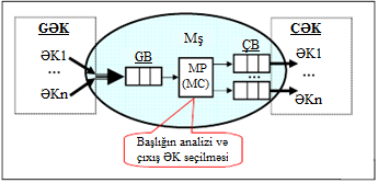 Marşrutlayıcı modeli